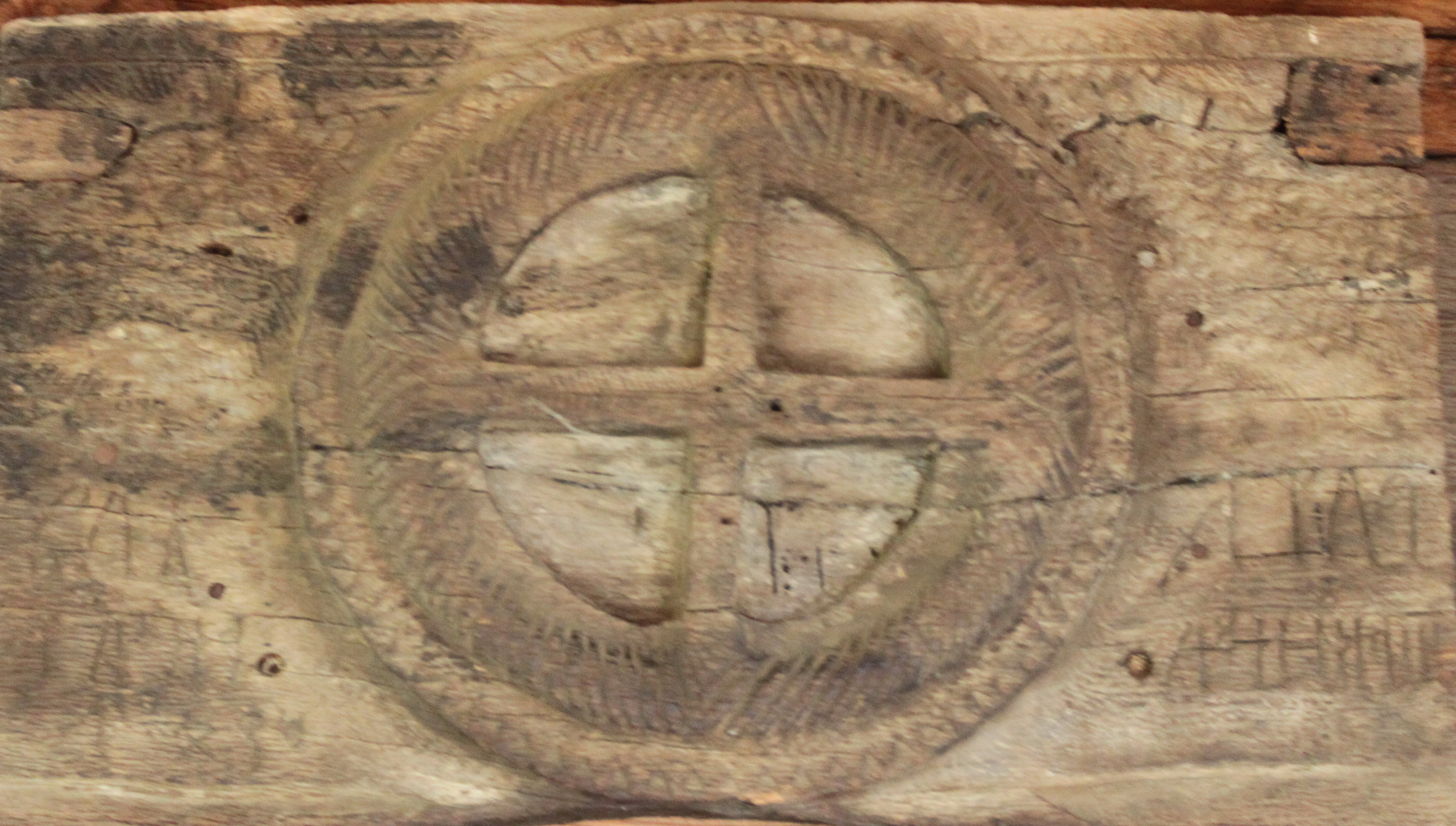 Biserica de lemn din Luieriu, judeţul Mureş acum biserica schitului Sf.Maria-Cricov de lângă oraşul Urlaţi, judeţul Prahova.